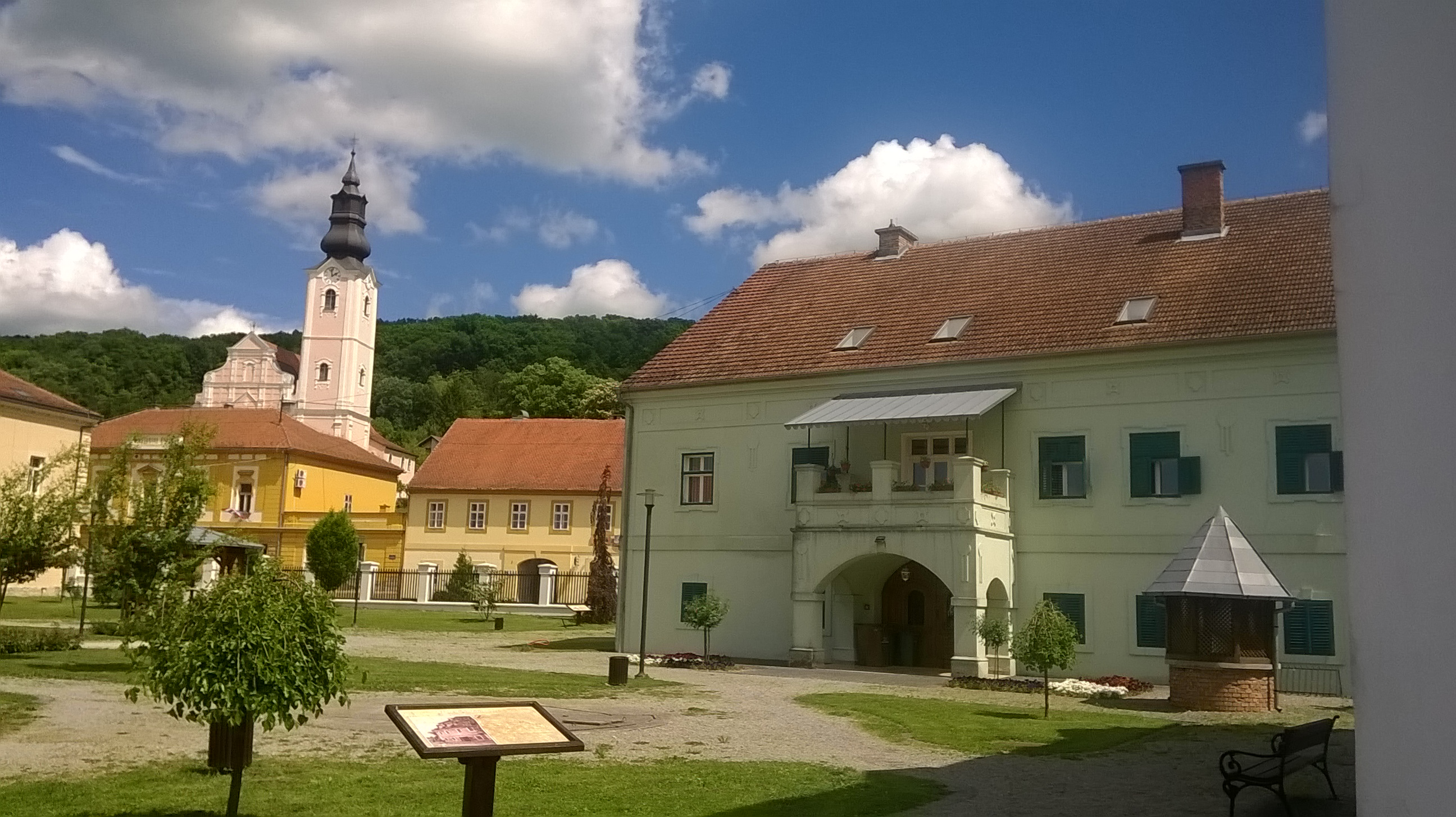 Pakrac, Zentrum